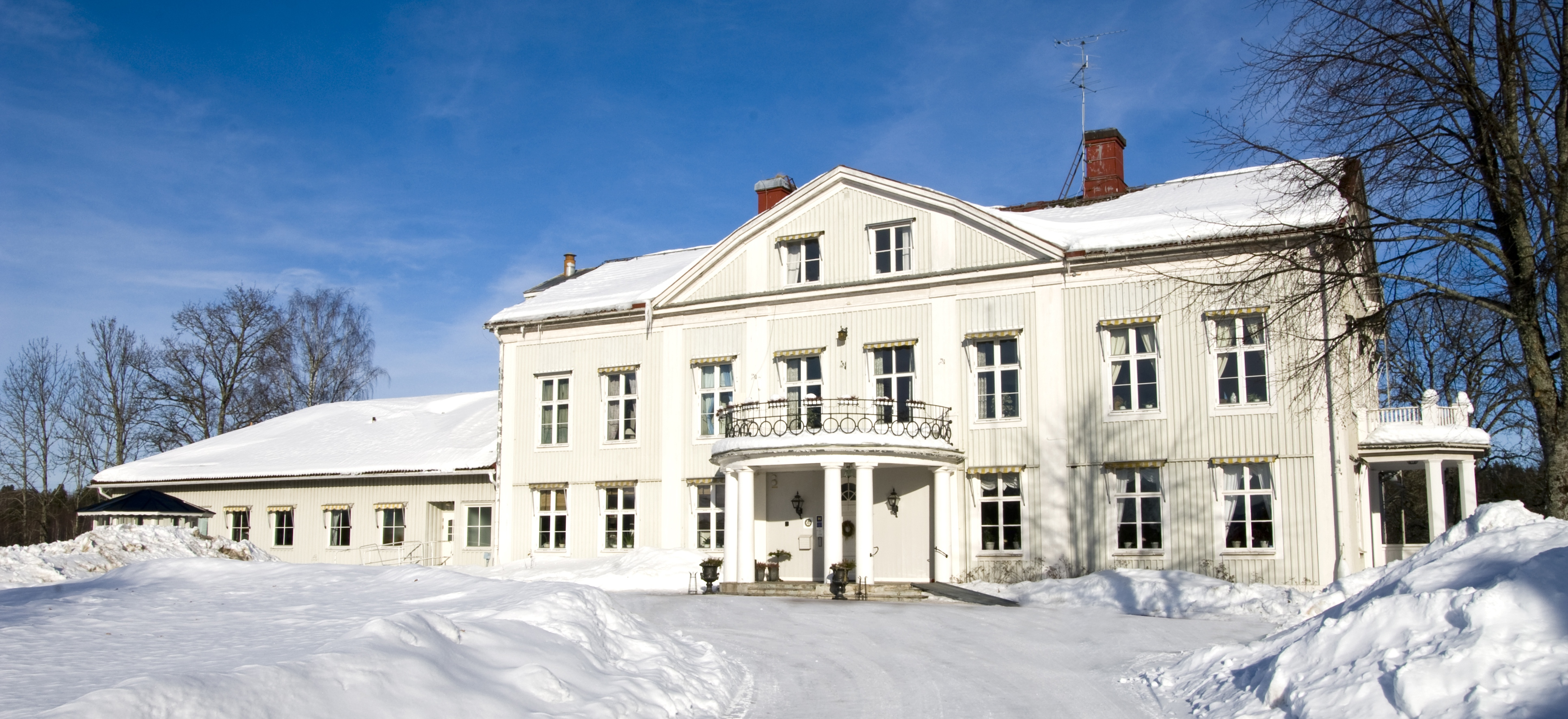 Dömle herrgård